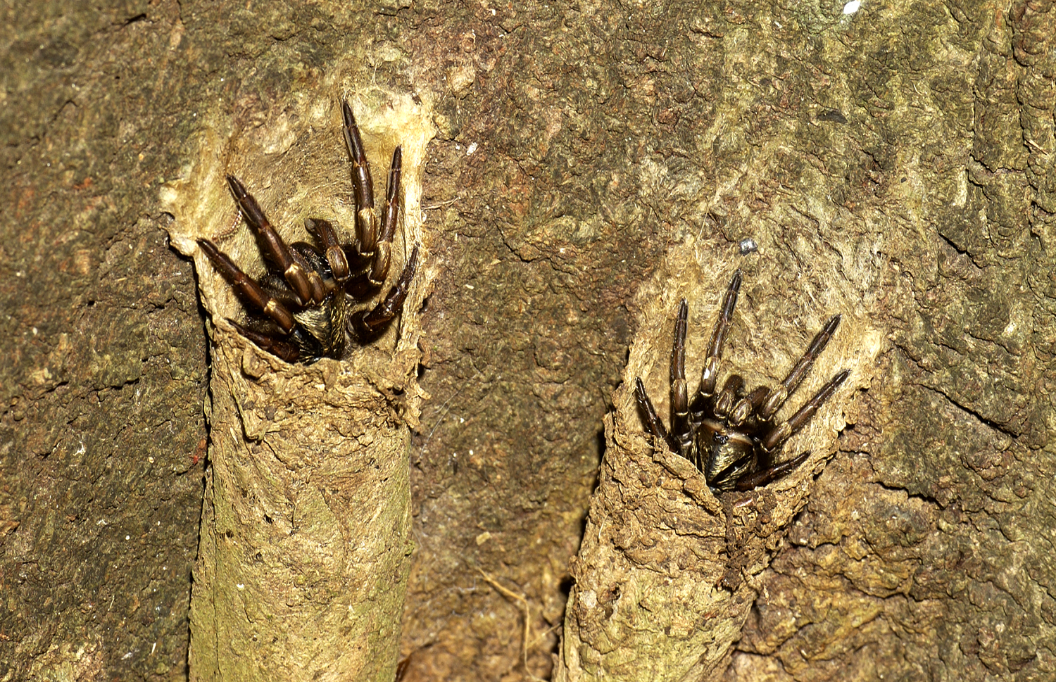 Misgolas robertsi